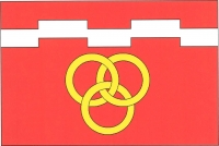 Babice (TR), vlajka. List tvoří tři vodorovné pruhy, červený, bílý oboustranně zubatý posunutý se dvěma zuby vysokými poloviny šířky pruhu a třemi stejnými mezerami a červený, v poměru 2 : 1 : 6. V dolním pruhu tři (2,1) žluté propletené kruhy. Poměr šířky k délce listu je 2 : 3.